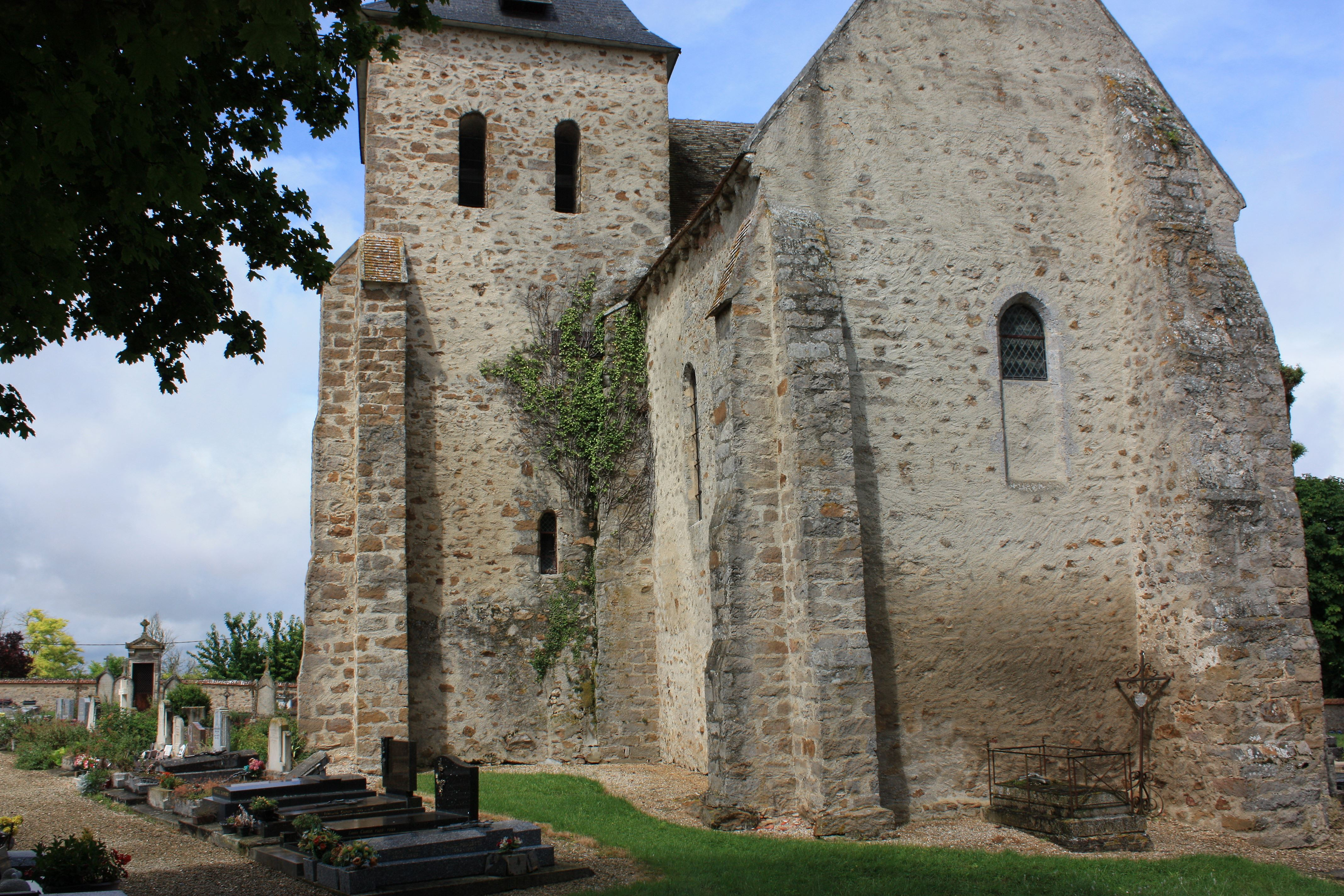 Gumery - Eglise Saint-Sévère Vue de l'Est